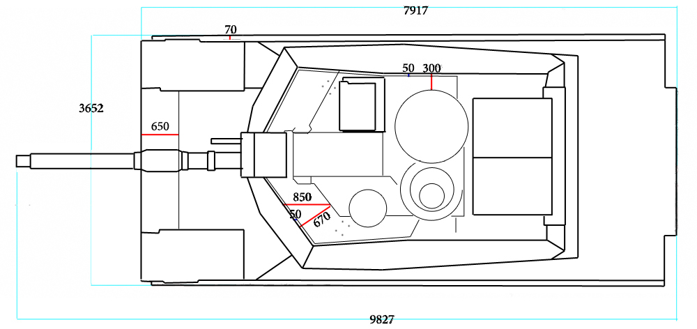 M1A1 Armor